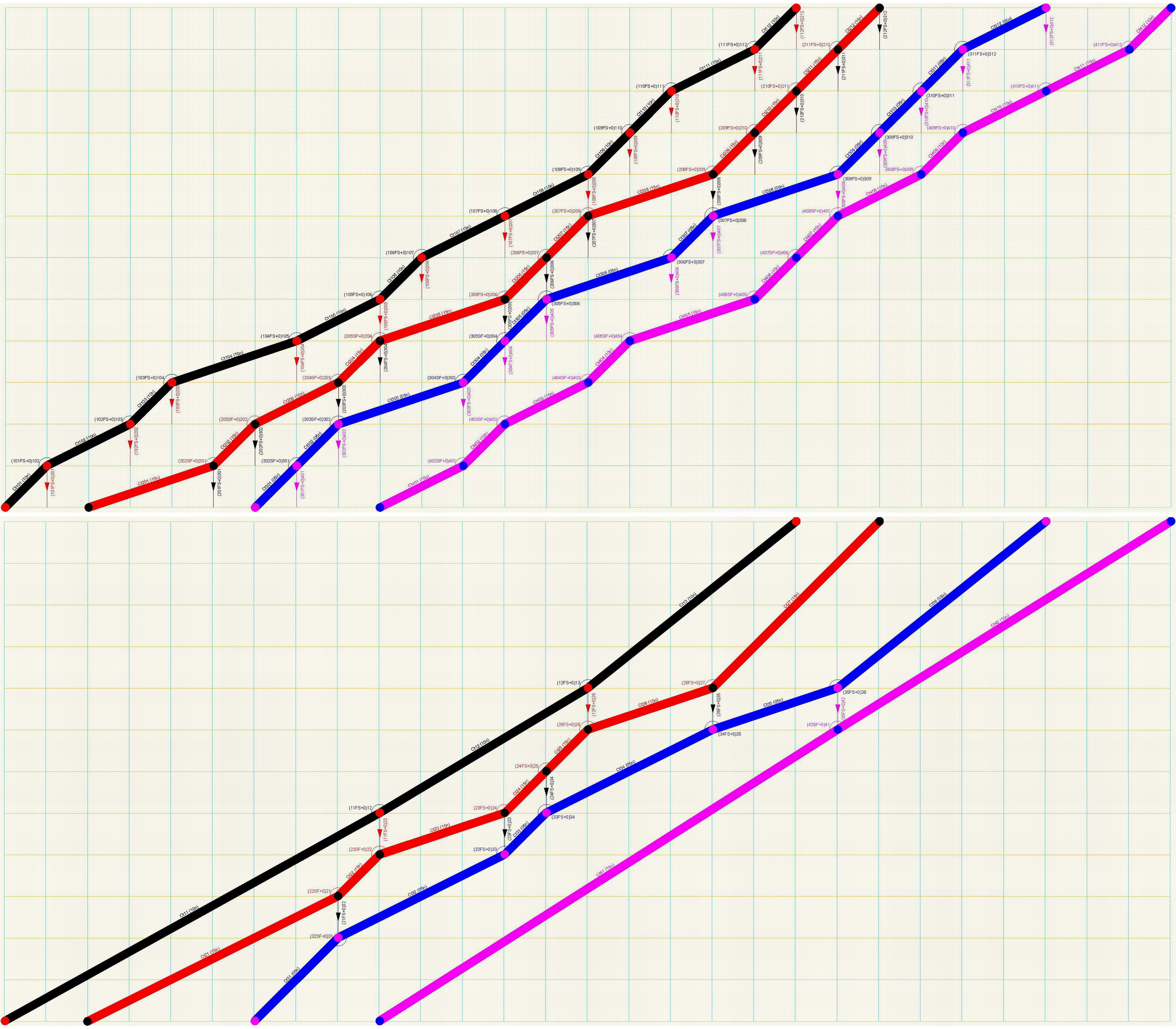 Dây chuyền chuyên môn hóa không nhịp nhàng, thể hiện trên sơ đồ xiên có gắn quan hệ công việc. Tôi vẽ bằng Auto CAD 2010, rồi chụp màn hình, và sửa đổi trên ACD FotoCanvas 3.0 cùng Paint.